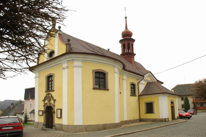 Kostel sv. Jana Nepomuckého - Studnice (NA)